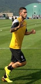 Opera propria